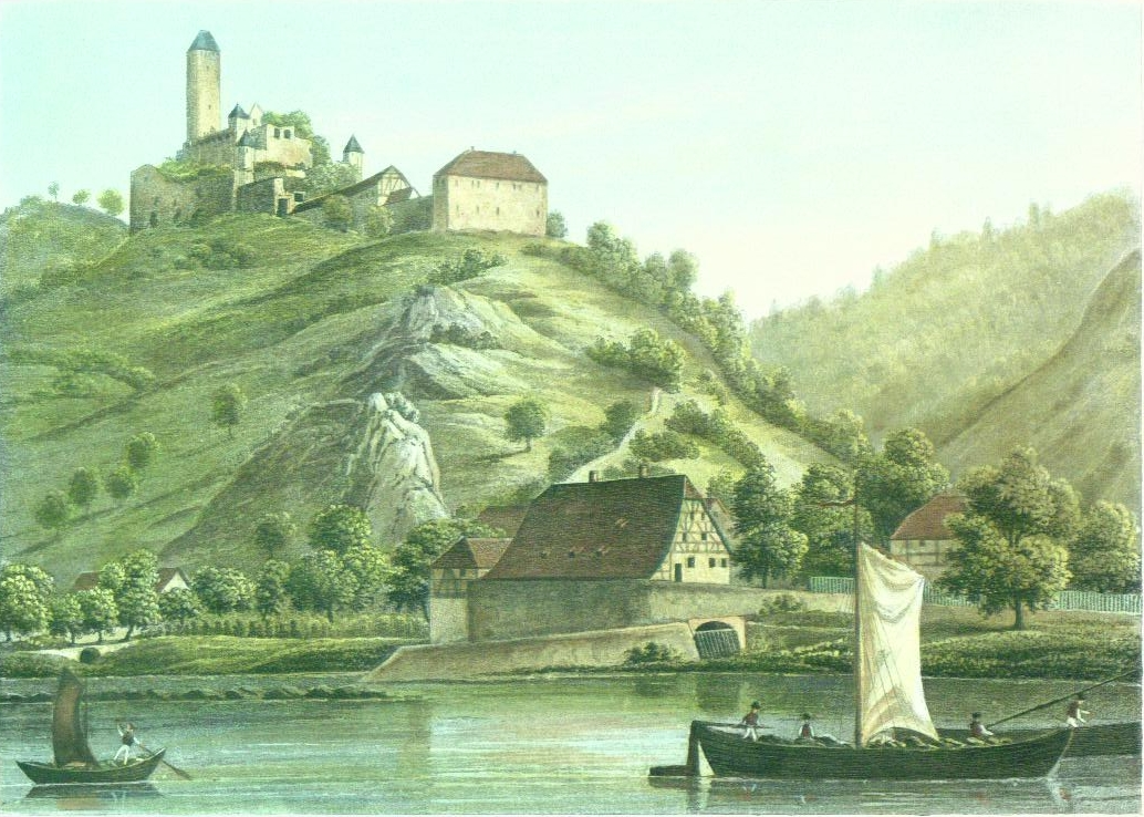 Burg Hornberg am Neckar, Aquatinta, koloriert